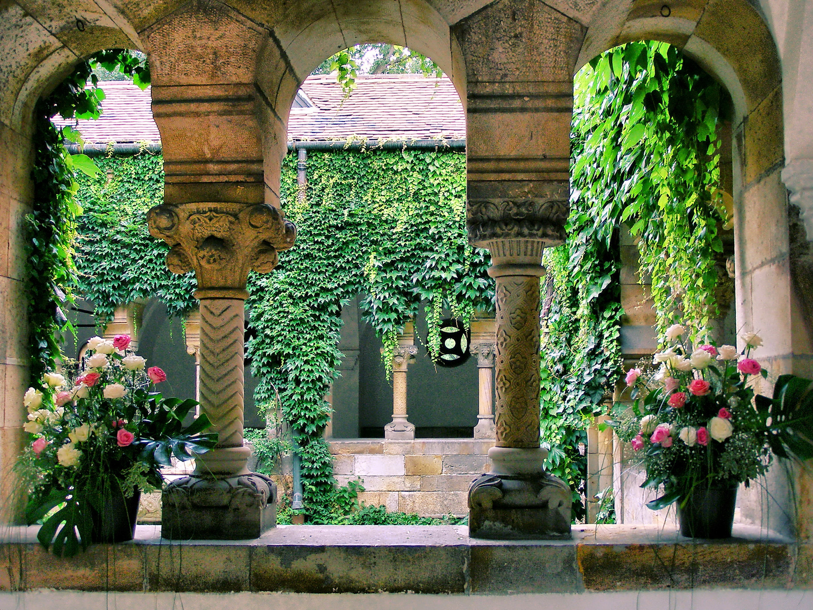 Vajdahunyad vára (Budapest 14, Városliget) This is a photo of a monument in Hungary. Identifier: 16291